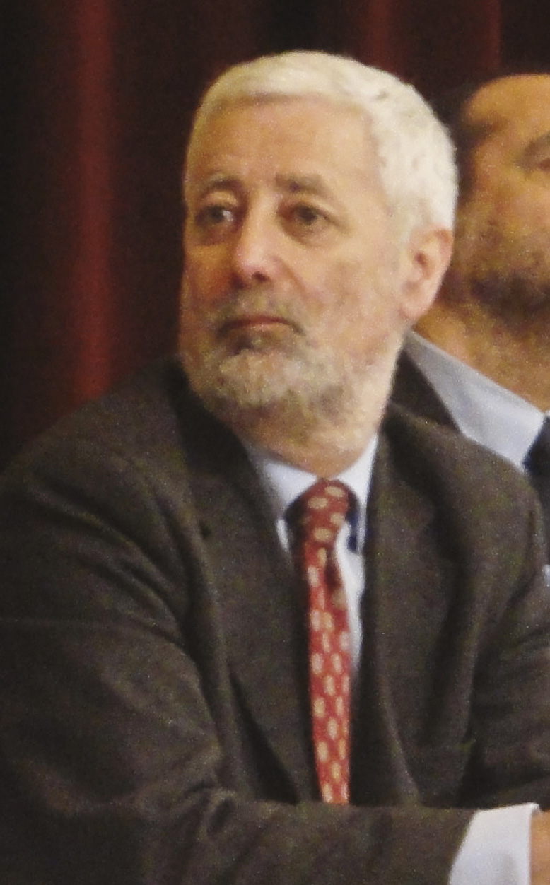 António Manuel Seixas de Sampaio da Nóvoa, 2013; Reitor da Universidade de Lisboa